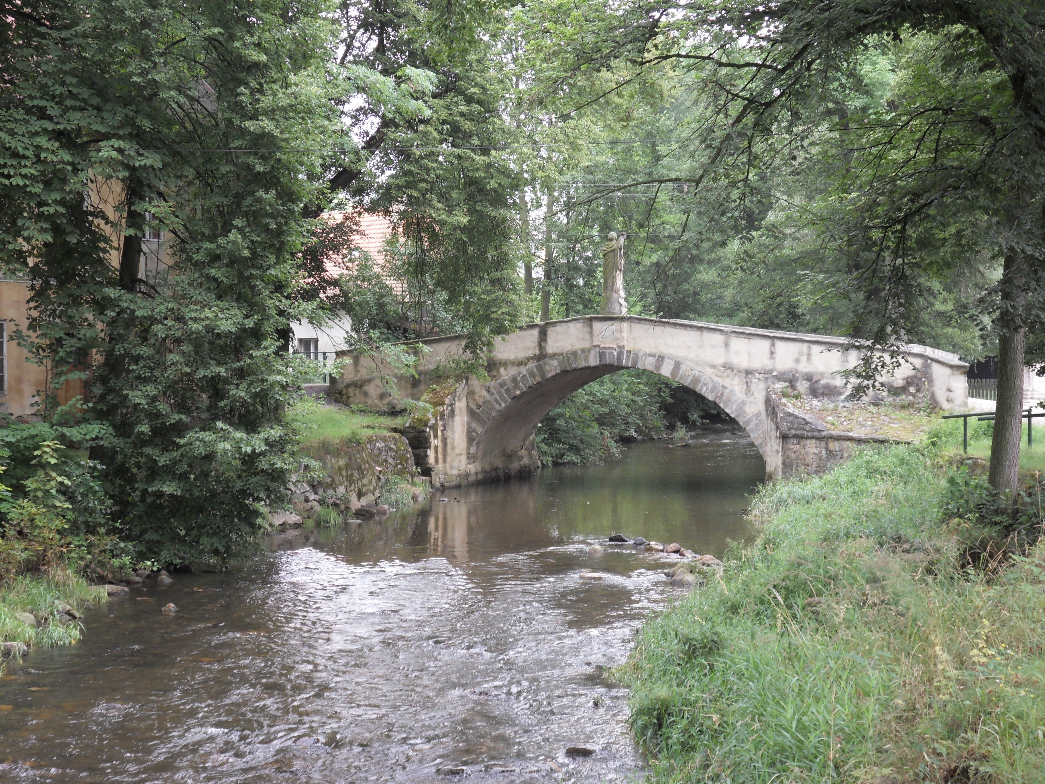 Pohled od jihozápadu na silniční most se sochami sv. Barbory a sv. Jana Nepomuckého (Dobřív), přes Padrťský potok, poblíž čp. 48, Dobřív, Dobřív.